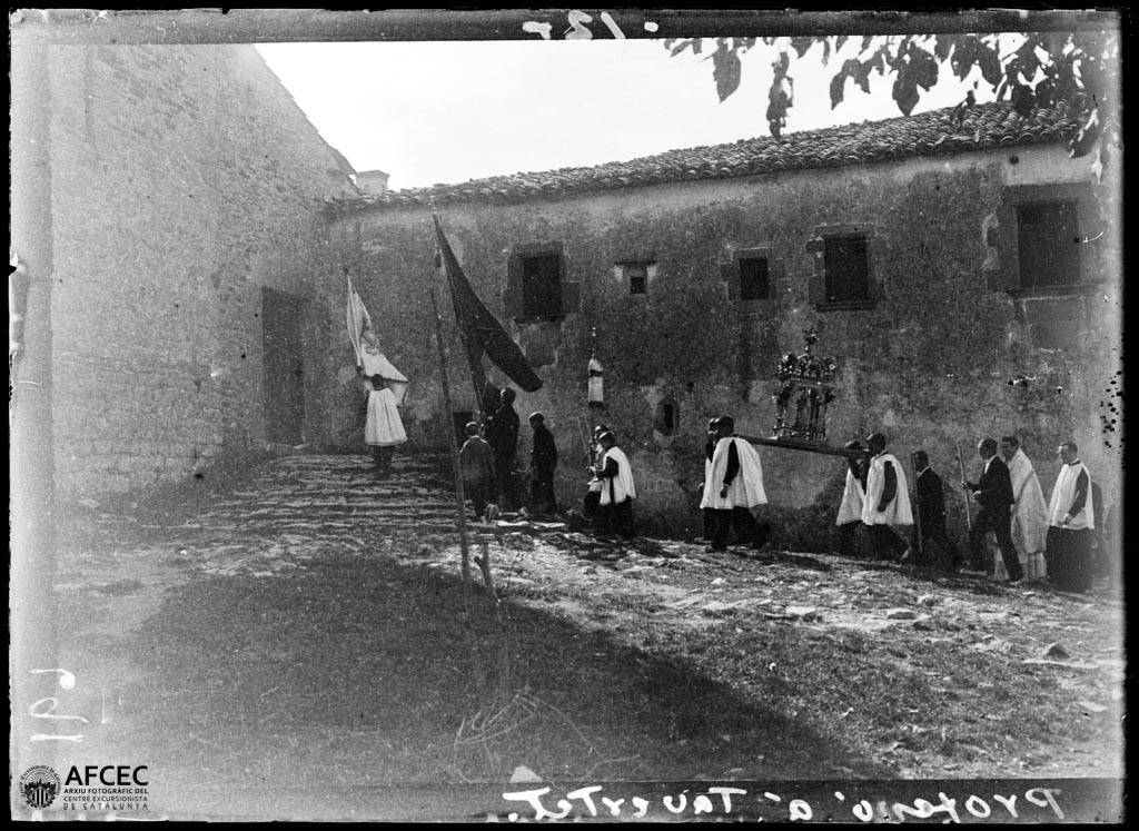 Imatge